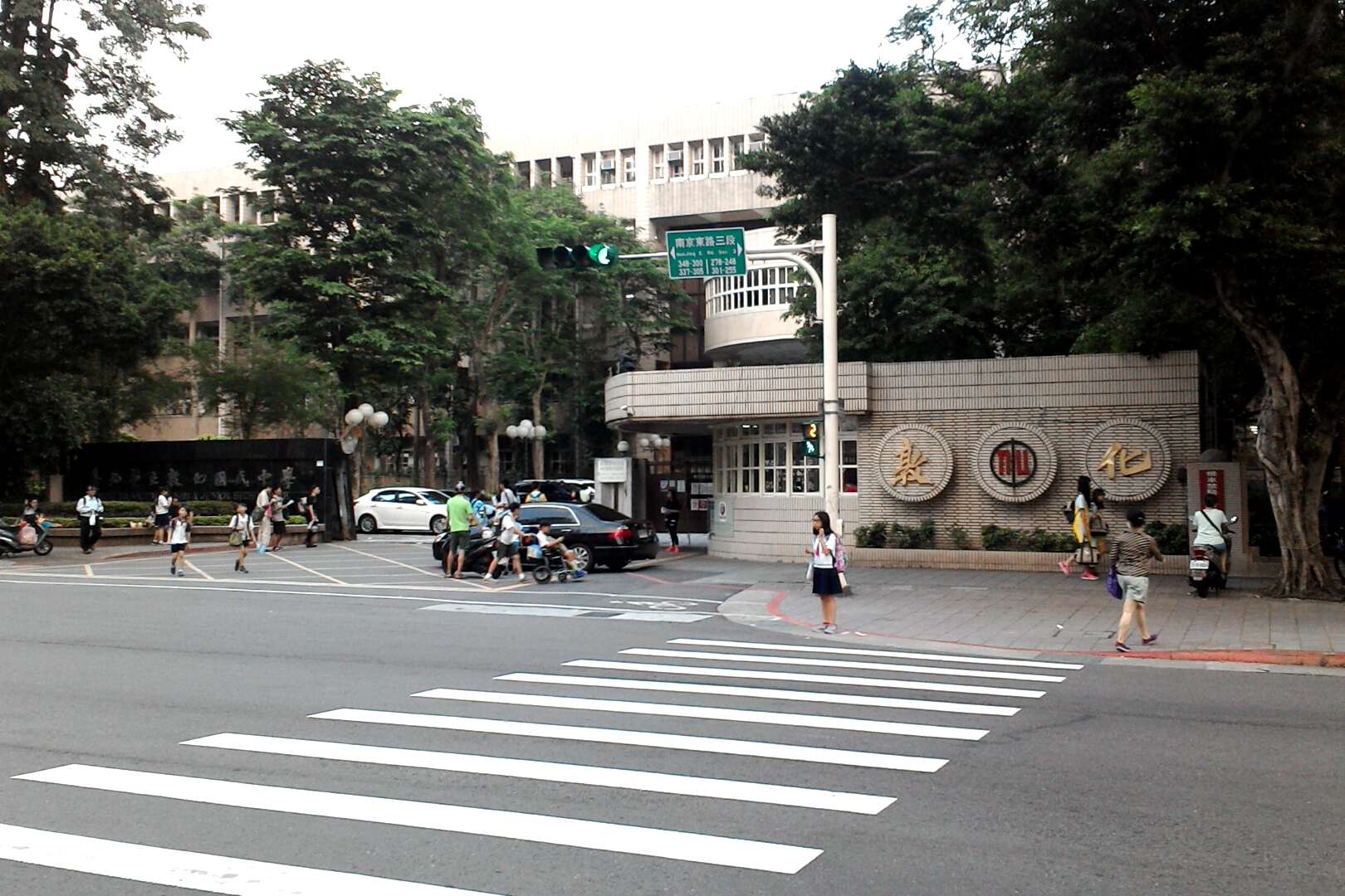 台北市立敦化國民中學(放學時間),台北市松山區中崙次分區中正里